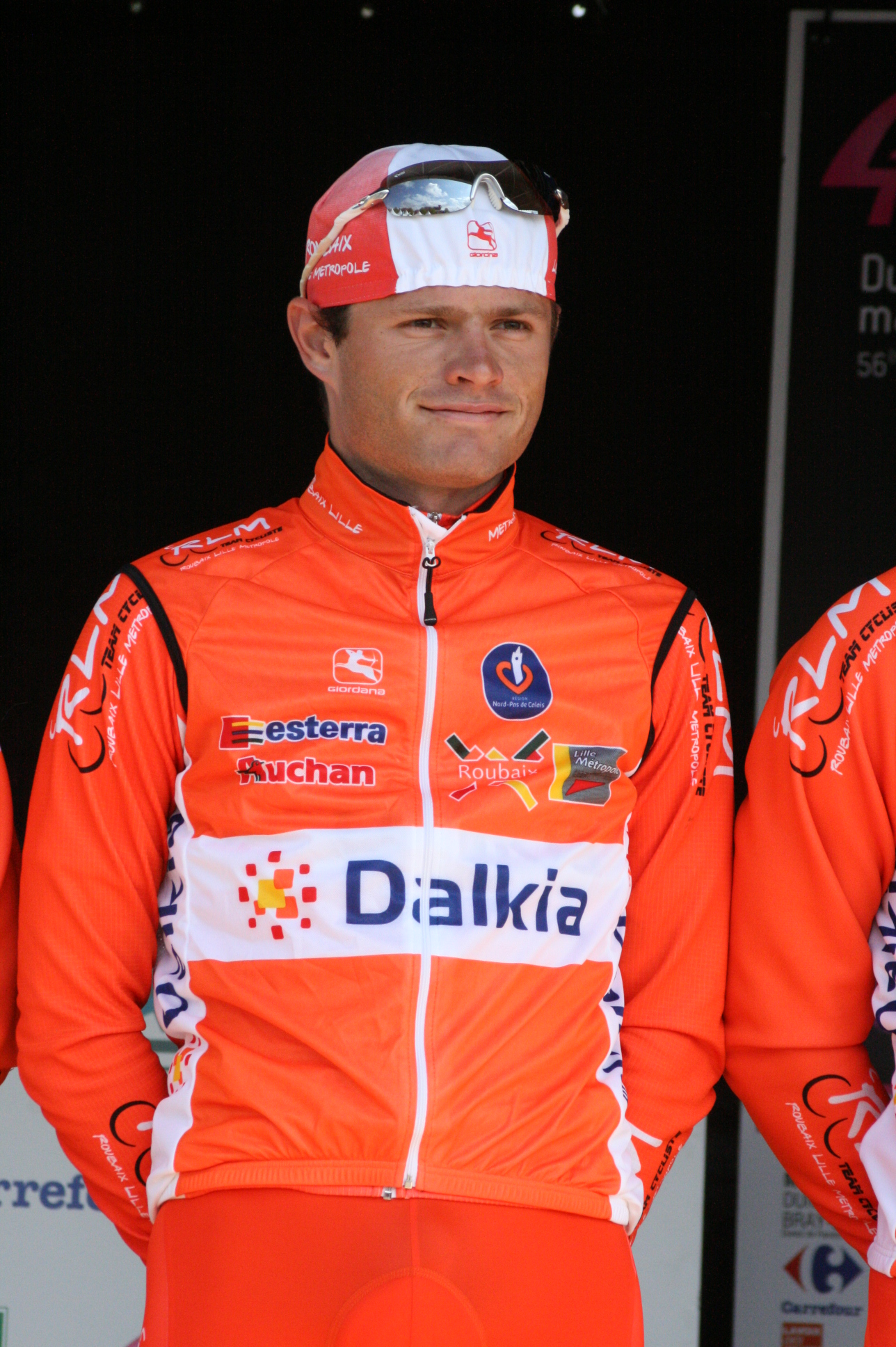 Steven Tronet, lors de la présentation des équipes des 4 jours de Dunkerque 2010